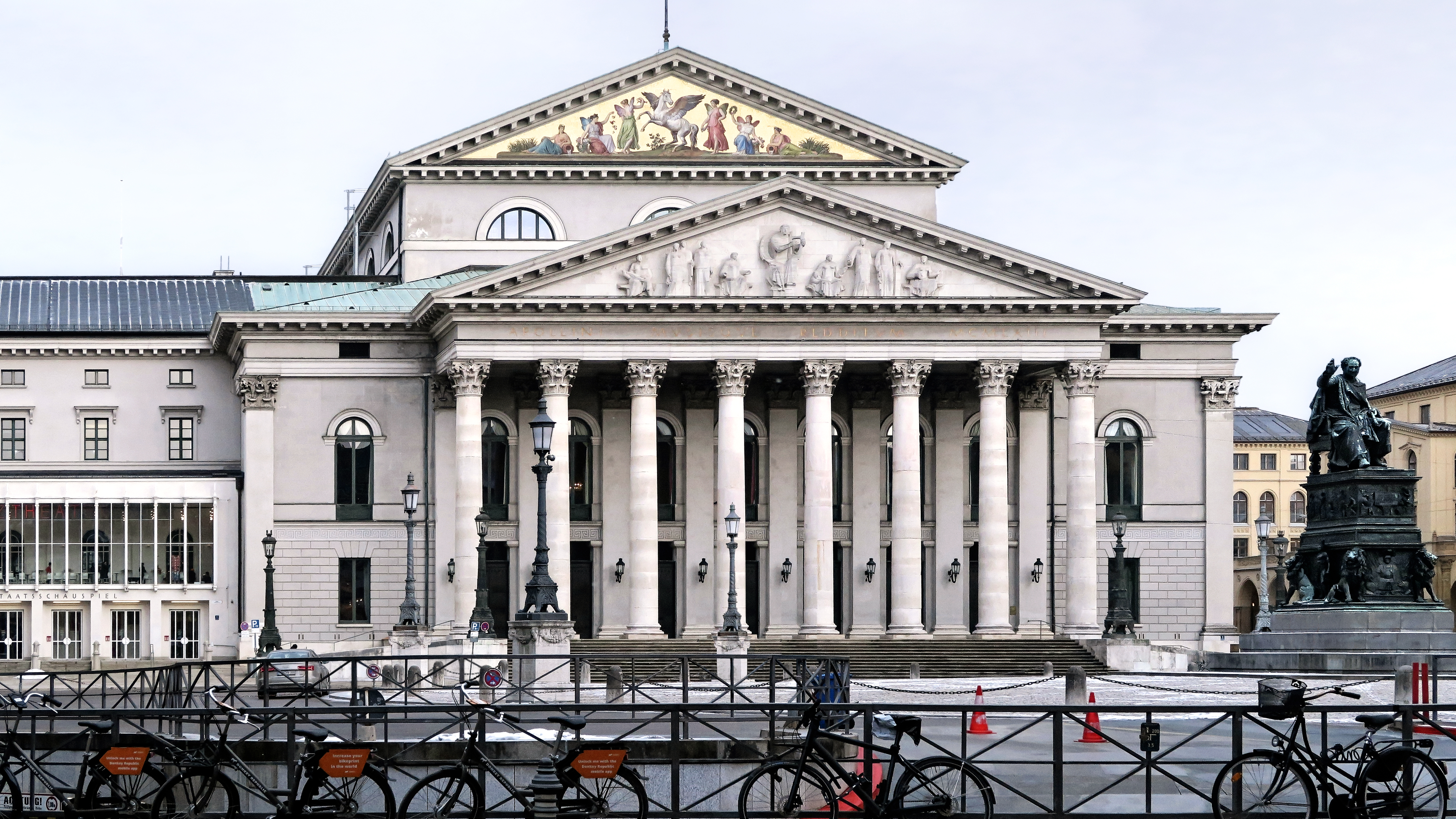 Außenansicht des Nationaltheaters, von der Ferne, links das Residenztheater, die Residenz ist angeschnitten